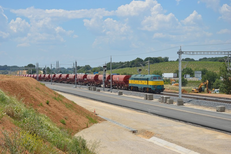 Locomotive HLD - Construction ligne CNM - Contournement Nîmes - Montpellier